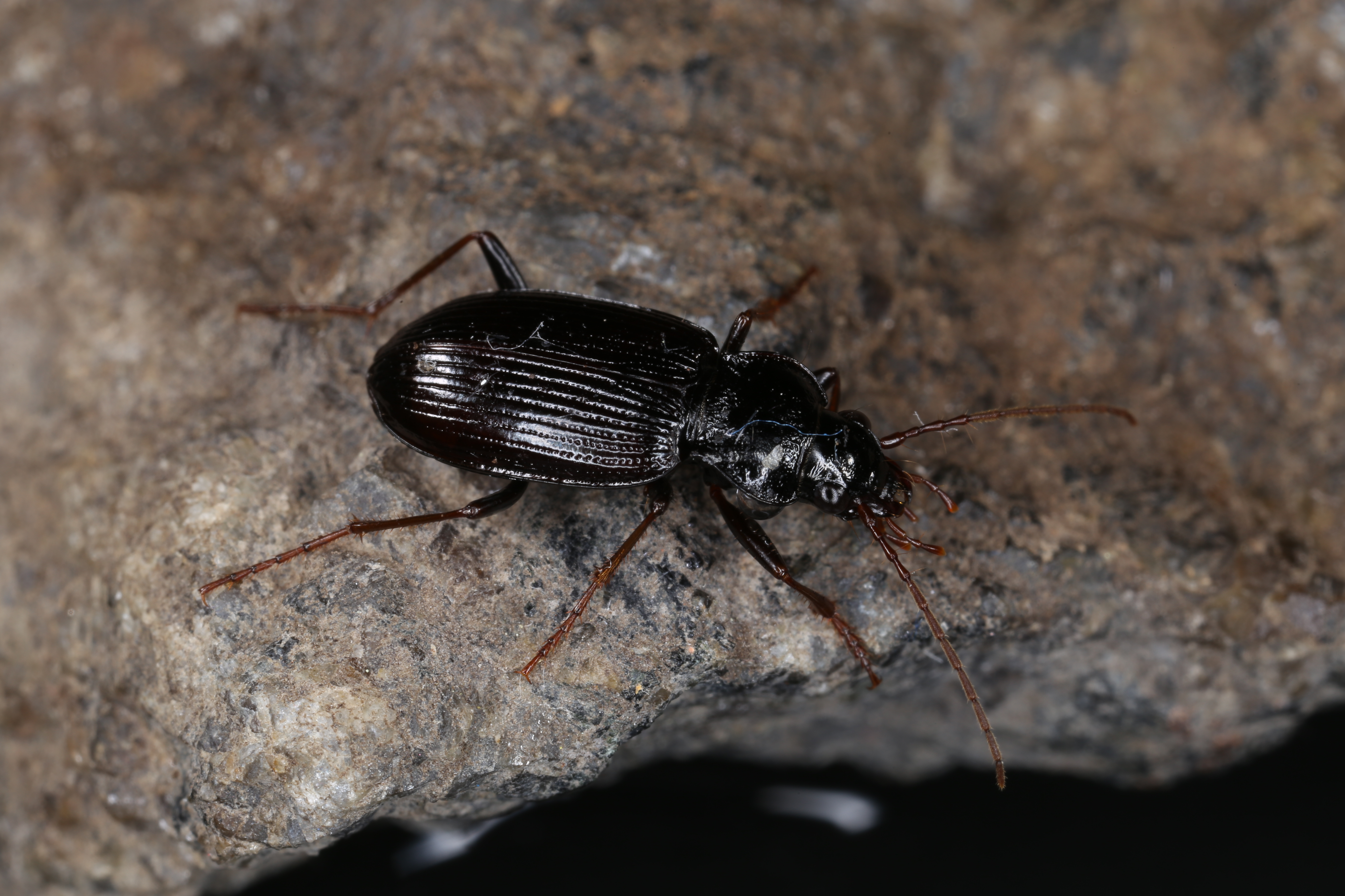 Nebria brevicollis (Fabricius, 1792), Søborg, Denmark, 20 June 2016